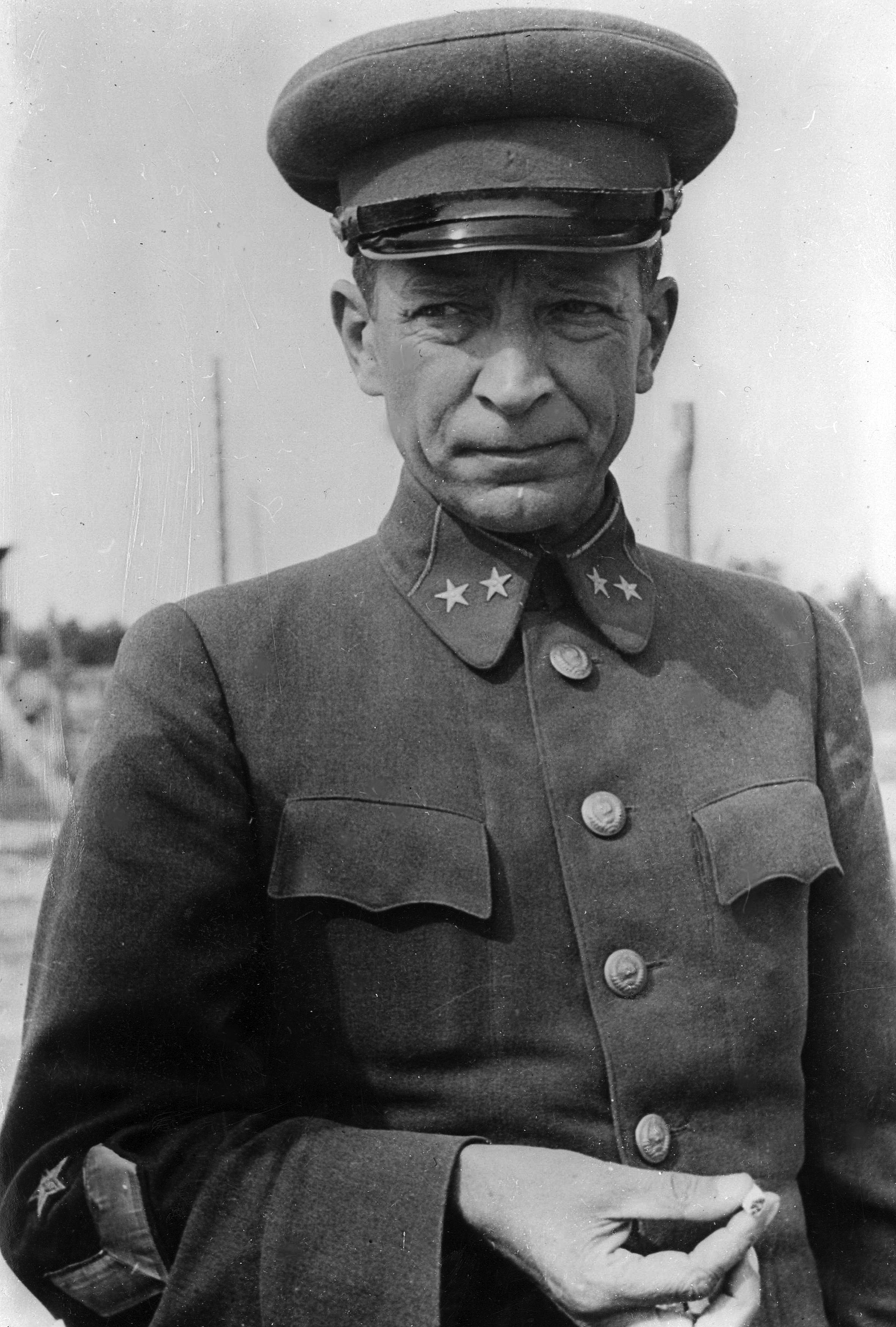 Generał Nikołaj Kiryłłow w niewoli niemieckiej.